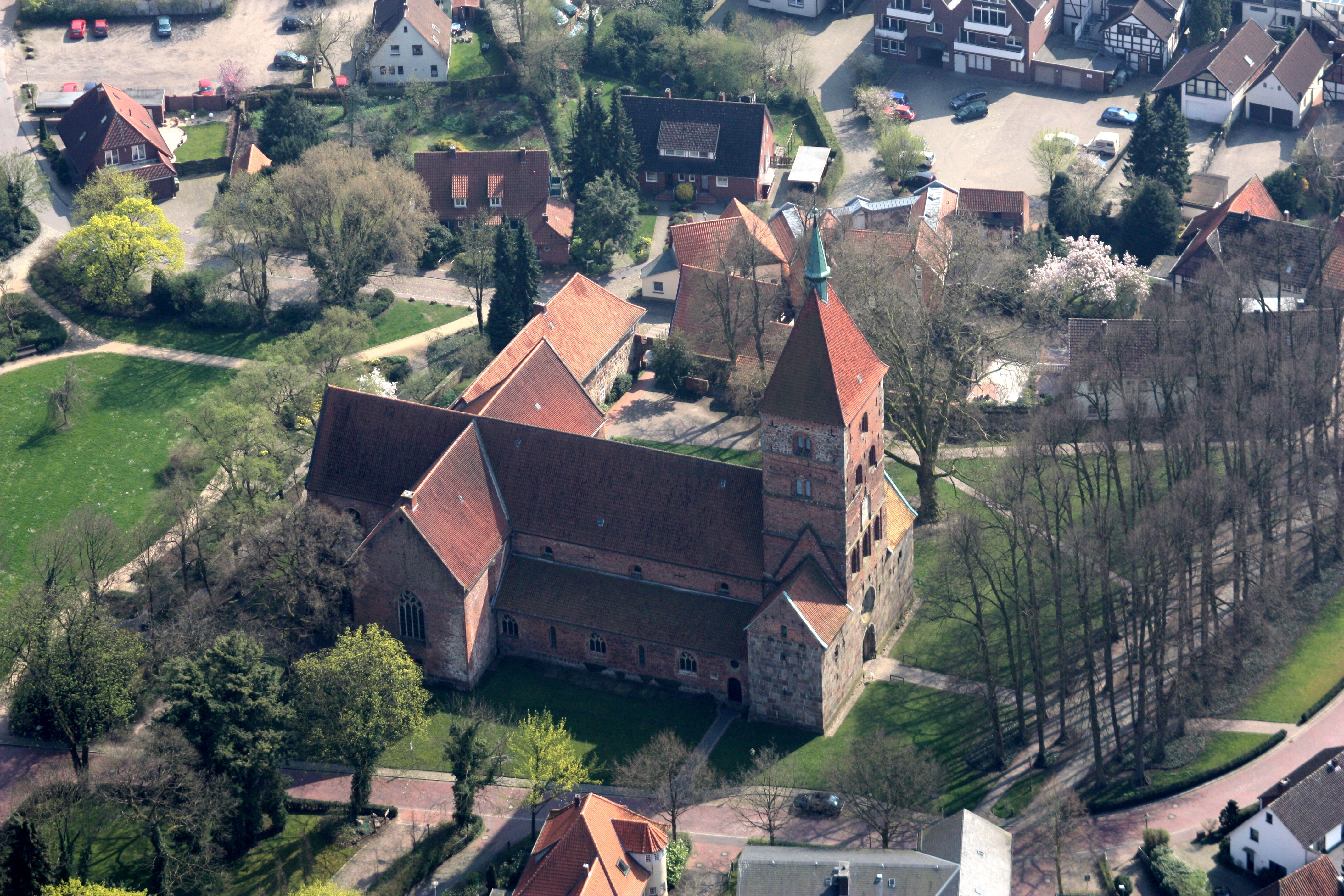 Deutschland, Niedersachsen, Wildeshausen Zentrum, Frühjahr 2009. Geradliniger Überflug über Wildeshausen in 1000 m Flughöhe von West nach Ost - über die beiden Seen im Westen, das Krandelstadion, die Alexanderkirche usw. Das Stadtzentrum liegt auf der rechten Seite des Flugzeuges. Blickrichtung rechts zum Flugzeug raus -also Blickrichtung nach Ost, Südosten und Süden